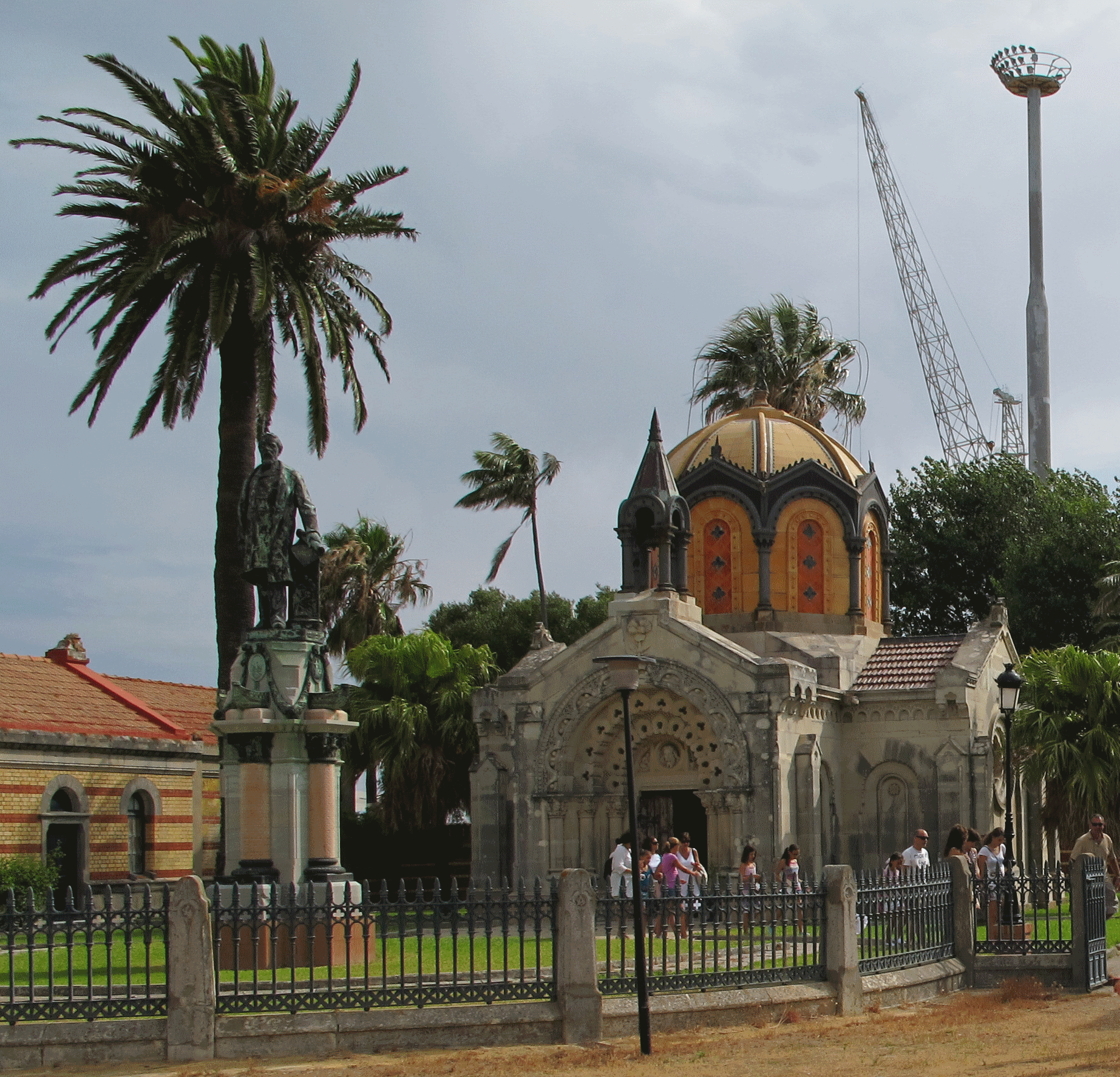 Vista de la capilla del Astillero de Navantia localizado en Puerto Real. Frente a ella encontramos una estatua, dedicada a su fundador.